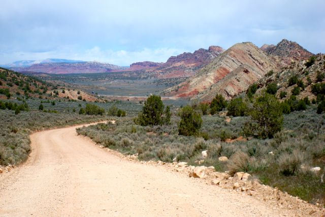 House Rock Valley Road — near Wire Pass Trailhead, House Rock Valley, Arizona.